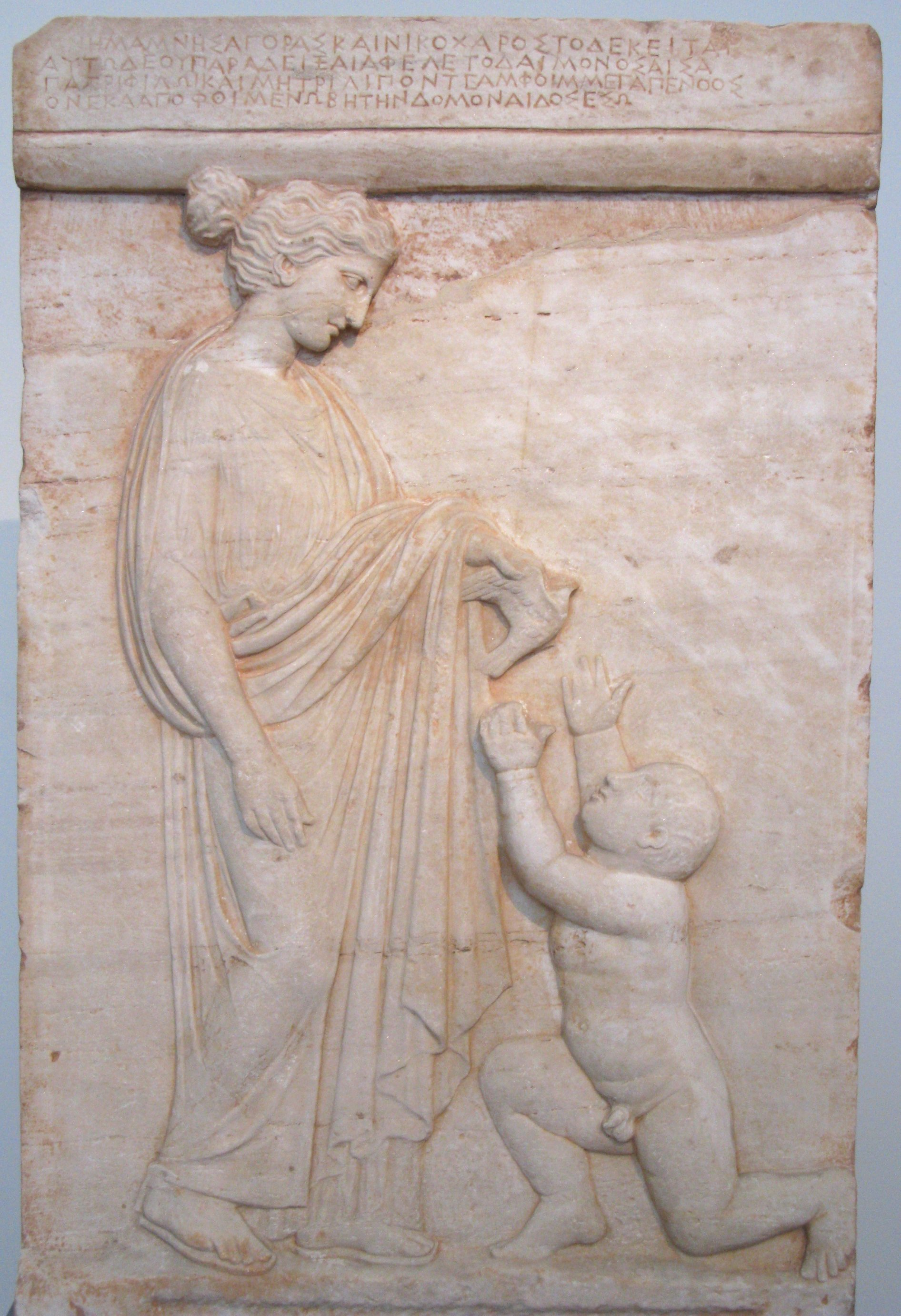 3845. Grave stele. Marble. Found in Vari. Attica, in the area of the ancient deme of Anagyrous. A standing girl to right offers with her left hand a bird to a young naked boy that sits up to catch it. The epigram on the epistyle indicates that the memorial was erected by the parents of the two siblings, Mnesagora and Nikochares. ca. 420 BC. National Archaeological Museum, Athens, Greece --- 3045. Επιτύμβια στήλη. Μάρμαρο. Βρέθηκε στη Βάρη Αττικής, στην περιοχή του αρχαίου δήμου Αναγυρούντος. Μία κόρη όρθια προς τα δεξιά με το αριστερό της χέρι πουλάκι σε μικρό γυμνό αγόρι, που ανασηκώνεται από το έδαφος για να το πιάσει. Όπως αναφέρει το χαραγμένο στο επιστύκιο επίγραμμα, το μνημείο είχαν στήσει οι γονείς των δύο αδελφών, της Μνησαγόρας και του Νικοχάρους. Γύρω στο 420 π.Χ. Εθνικό Αρχαιολογικό Μουσείο. Αθήνα.